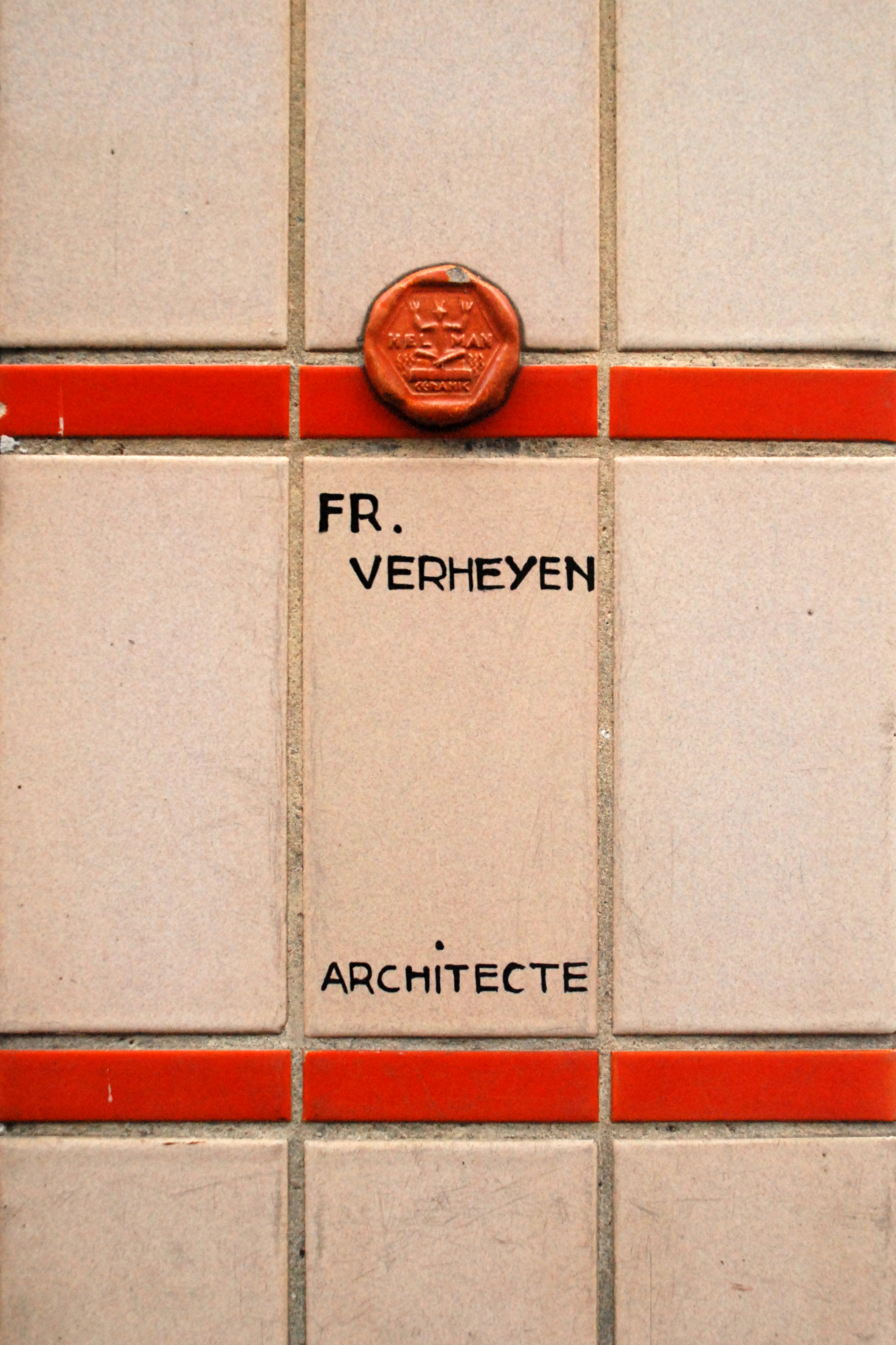 Belgique - Bruxelles - Berchem-Sainte-Agathe - Rue de l'Eglise 58 - Modernisme - Ateliers Helman